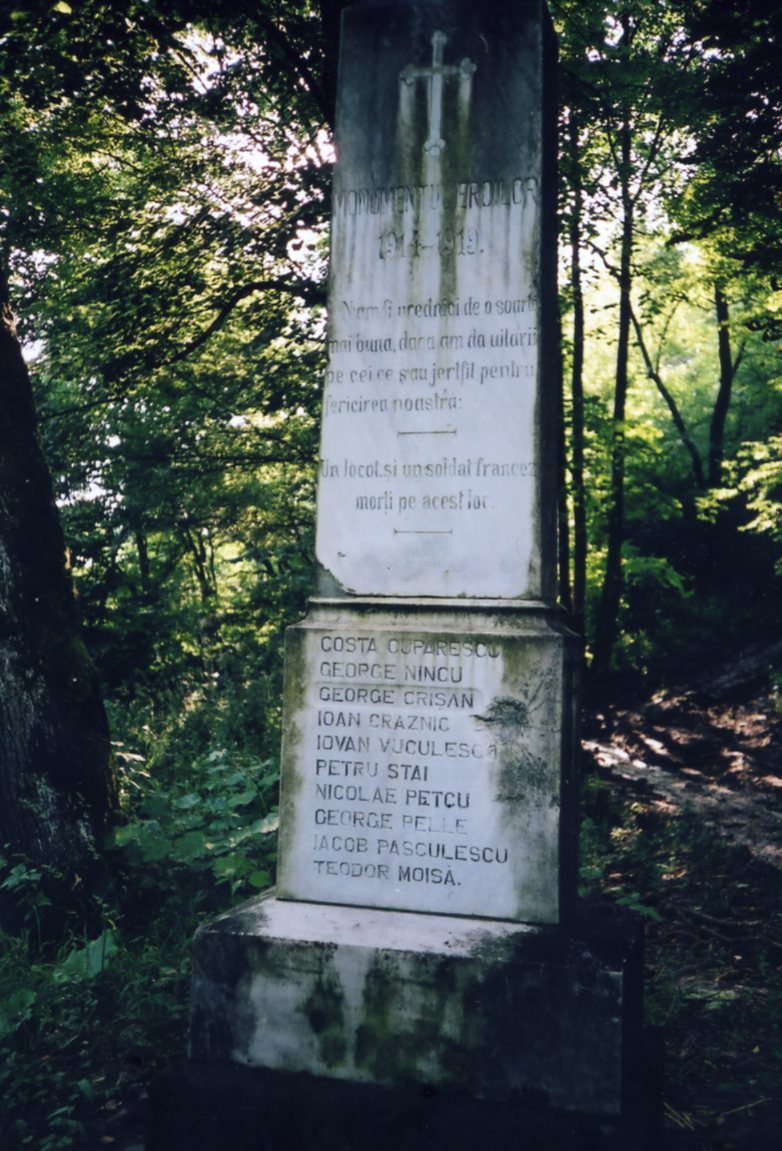 Monument Berthelot - Lipova, Romania